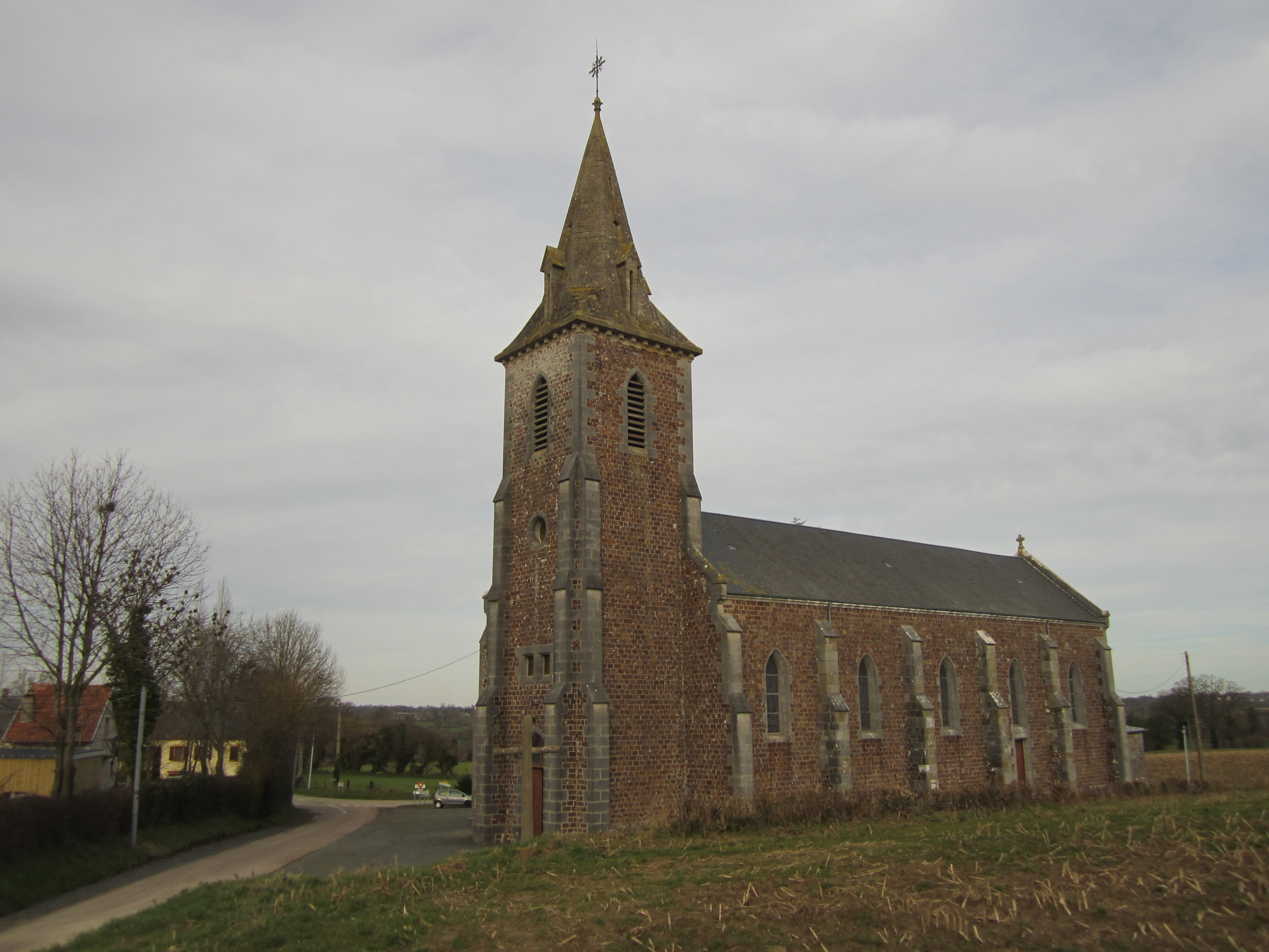 Guéhébert, Manche